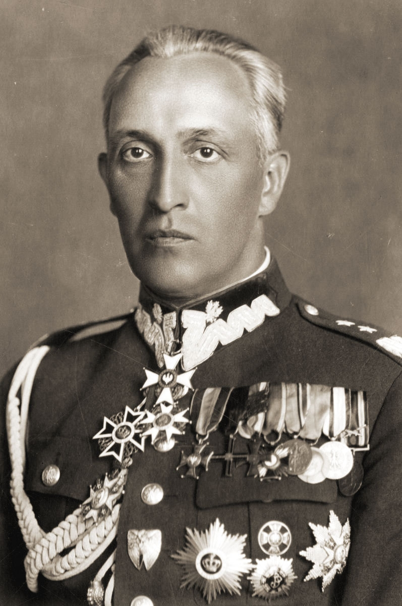 General Gustaw Orlicz-Dreszer (d. 1936)